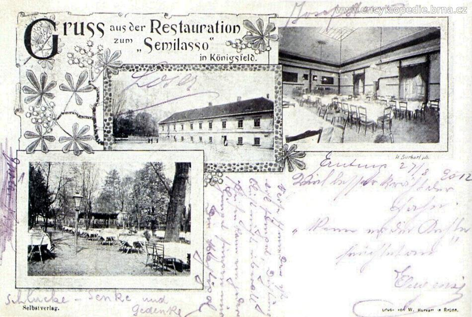 Semilasso v Brně-Králově Poli